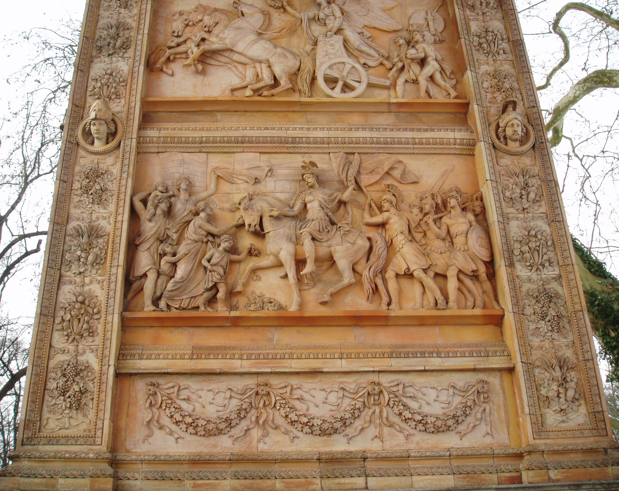 Reliefbilder am Triumphtor, Potsdam